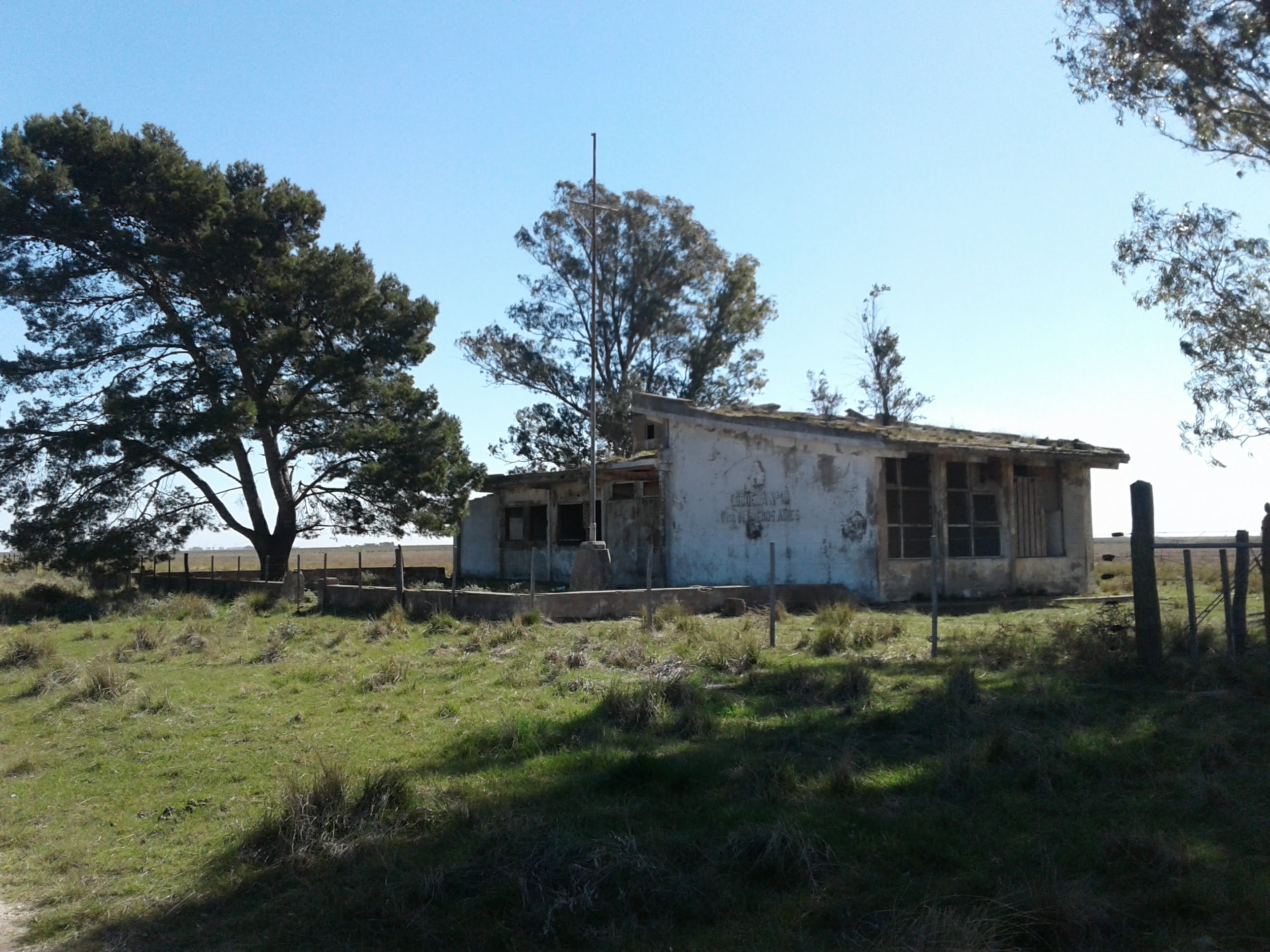 Escuela en el paraje de Paso Mayor, Municipalidad de Coronel Rosales, Provincia de Buenos Aires.